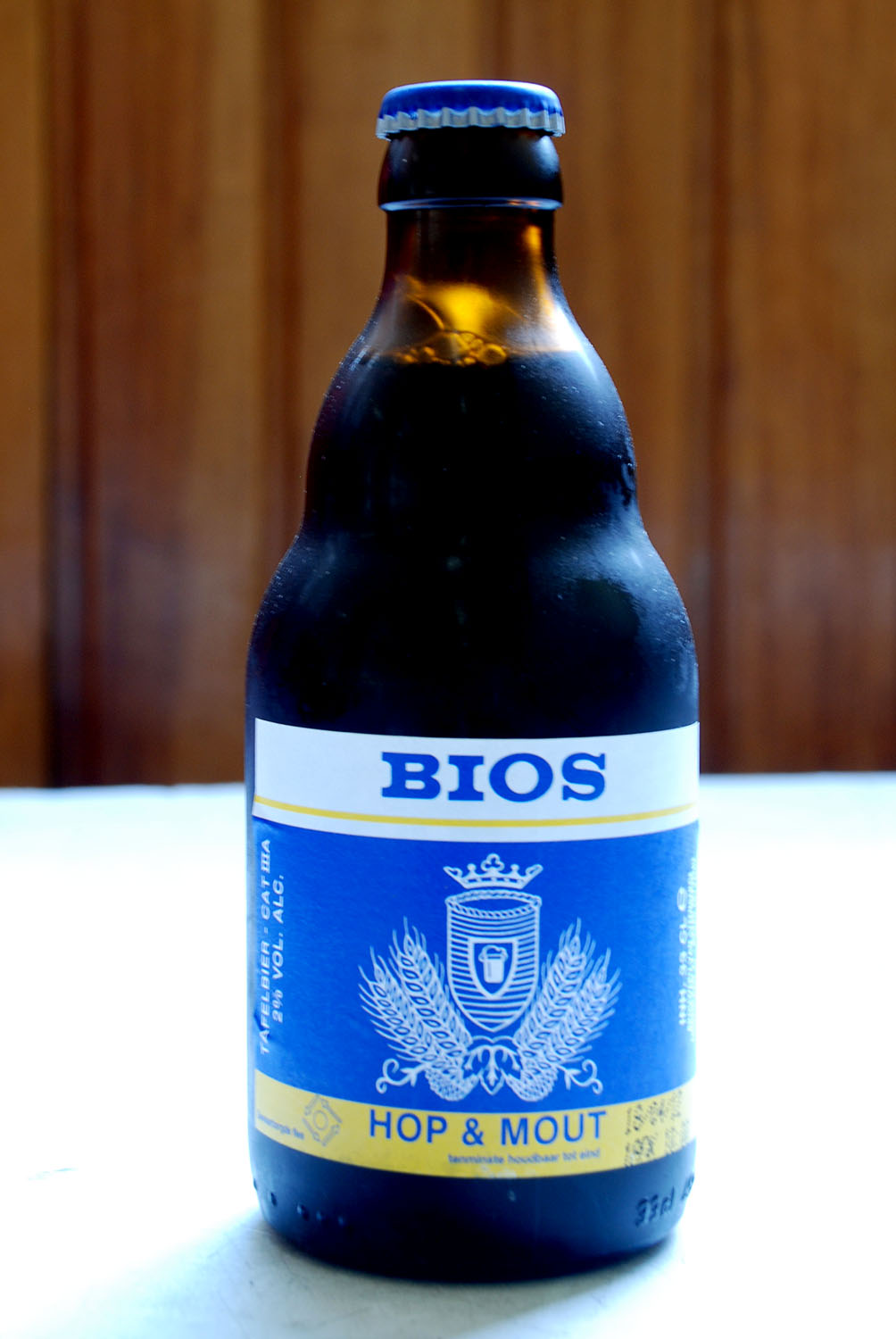 Bios tafelbier